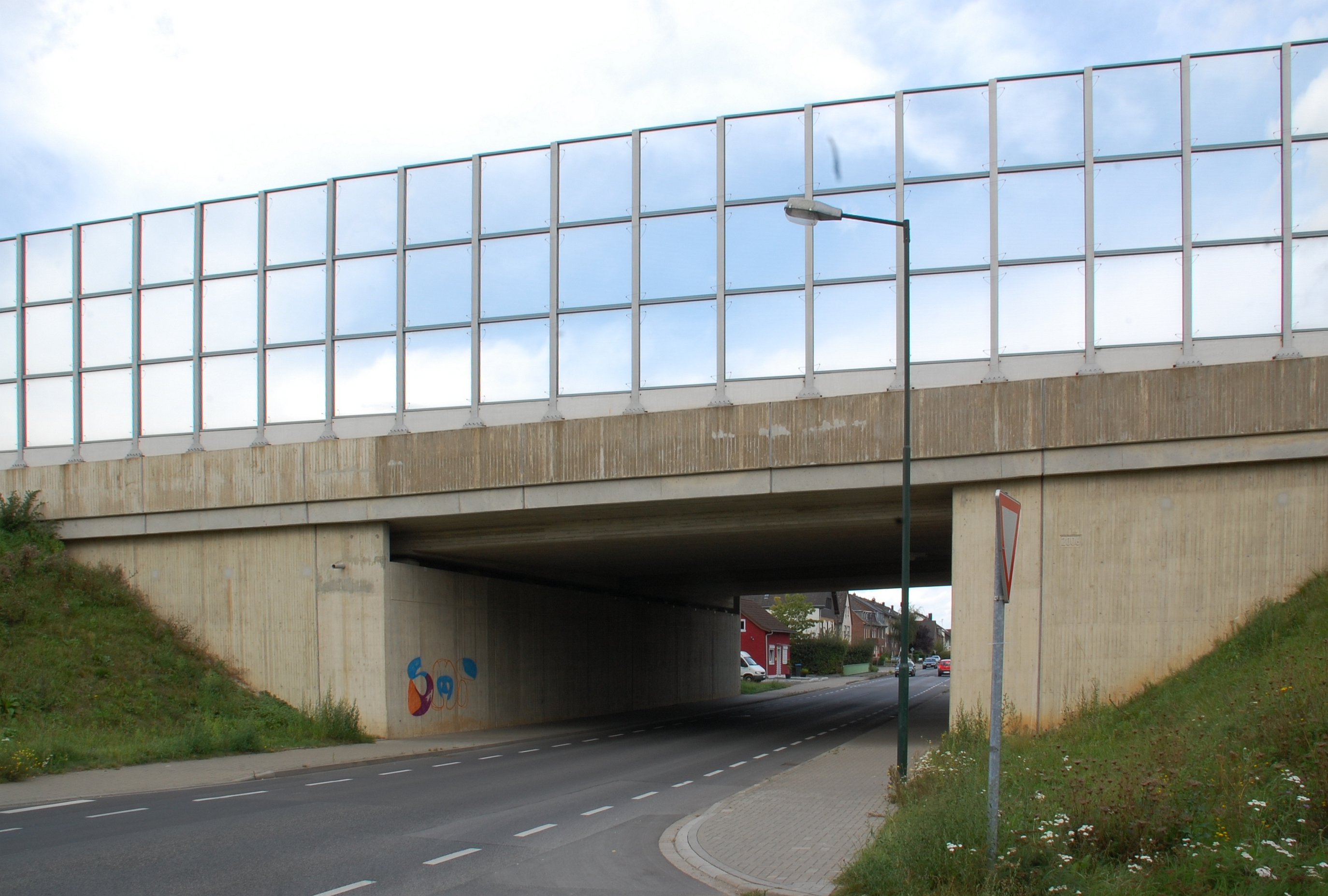 Autobahnbrücke der A 4 mit Lärmschutzwand in Horrem, Kerpen